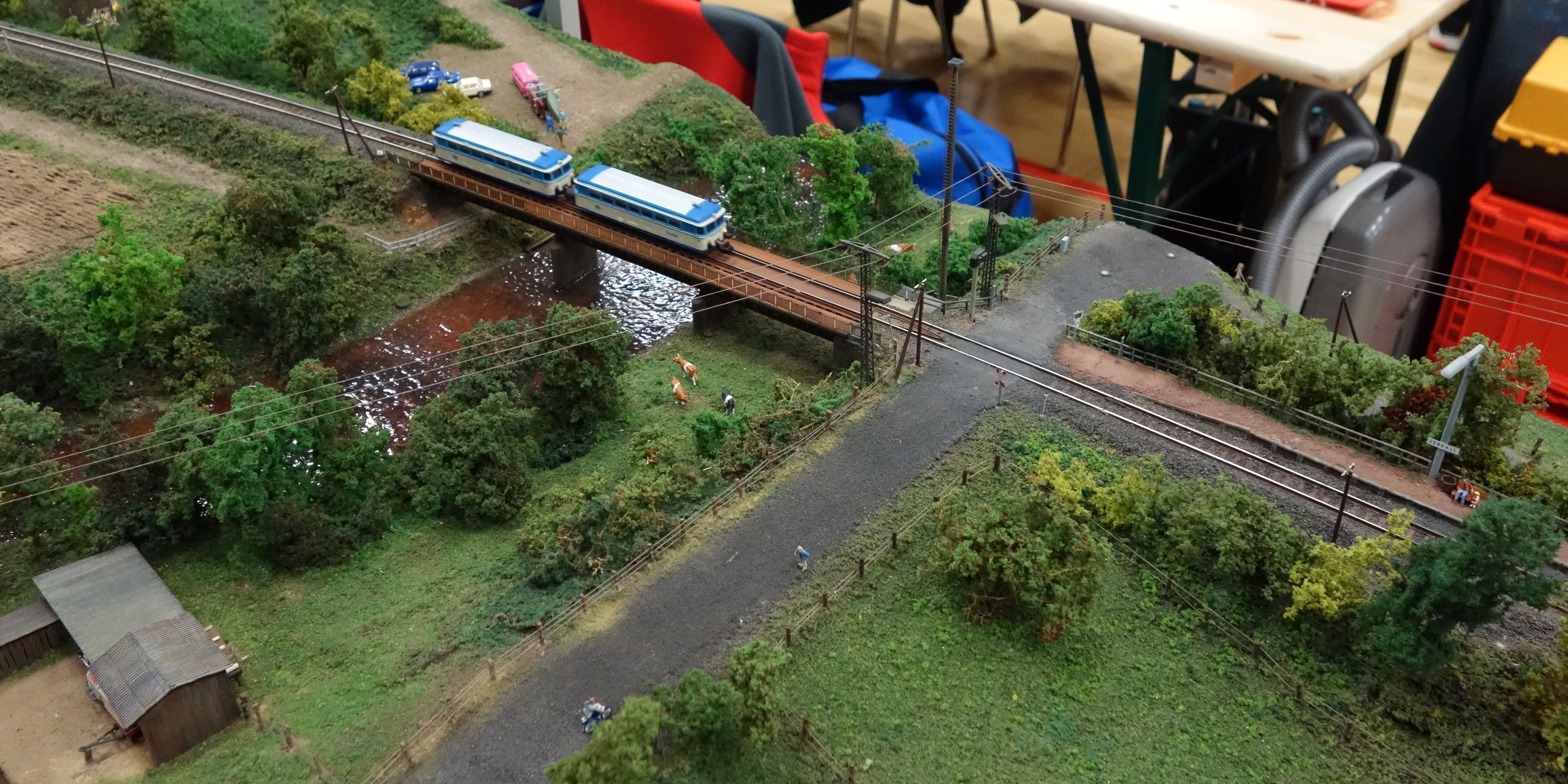 N-Modell des Rurtalbahn-Haltepunkts Zerkall mit Rurbrücke und herannahendem Schienenbus der Dürener Kreisbahn, Zustand Mitte der 1990er-Jahre, erbaut durch den Verein "Modellbahnfreunde Düren", jetzt Modelleisenbahn-Gemeinschaft Kerpen-Düren e.V., Ausstellung des Arbeitskreis Rheinlandbahnen in der Hardtberghalle Bonn am 30. März 2014